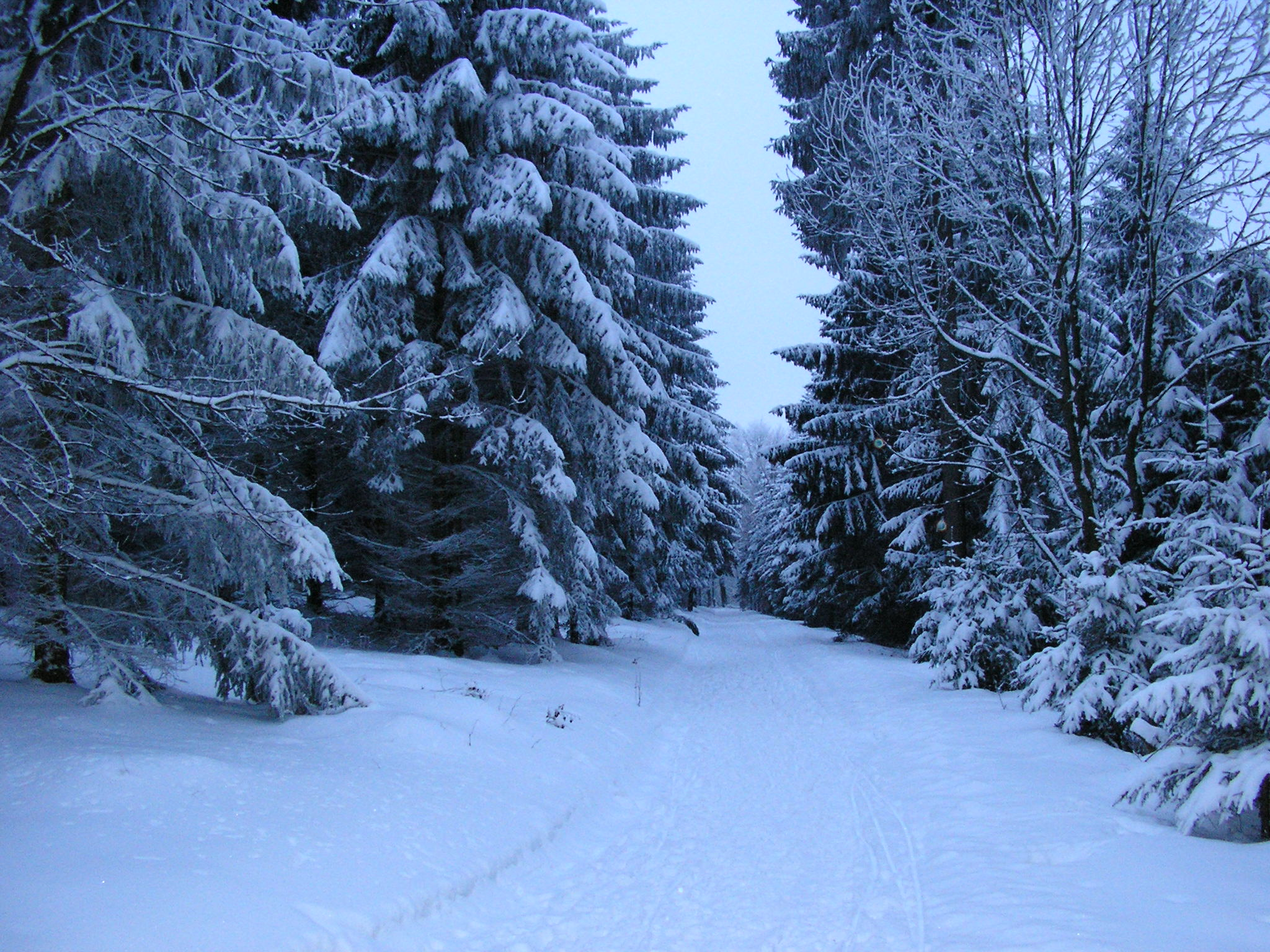 Winter im Wiehengebirge nahe dem Heidbrink